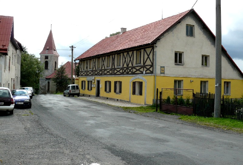 Kostel v obci Krásná Lípa, okres Sokolov, ČESKO, a penzion na silnici směr obec Šindelová